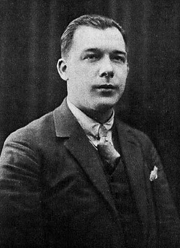 De Pierre Kellner (1900-1977).